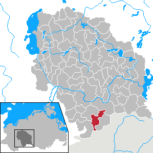 Marnitz in Mecklenburg-Vorpommern - District Parchim